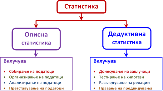 Двете гранки на статистика